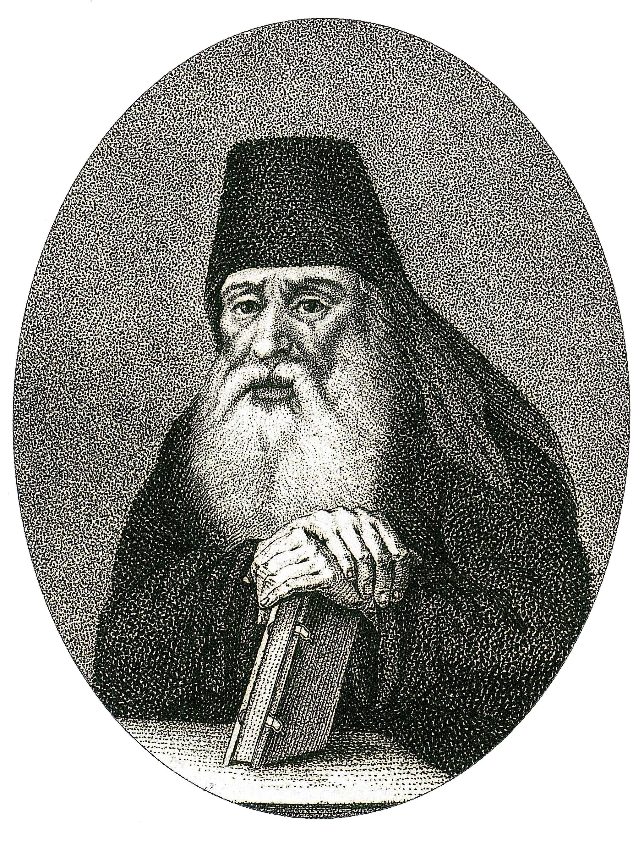 Симеон Полоцкий, иеромонах, наставник царевича Федора Алексеевича. Литография 1818 года.